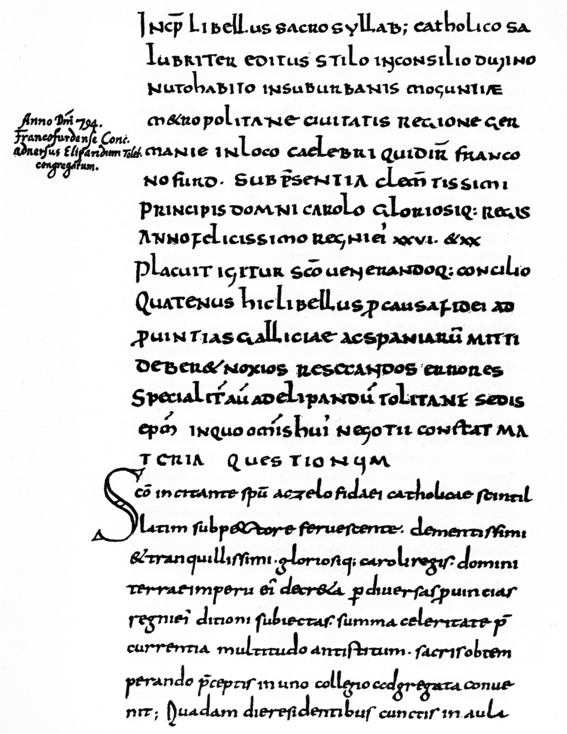 Erwähnung Frankfurts im Libellus sacrosyllabus des Paulinus von Aquileia aus dem Jahr 794. Die ersten zwei Drittel des in Latein verfassten Textes sind mit der Feder in der Schriftart Halbunziale geschrieben, das mit der Initiale beginnende untere Drittel in der Karolingischen Minuskel. Die Marginalie in der linken Spalte ist frühneuzeitlich, bei ihr beginnt fol. 42v.